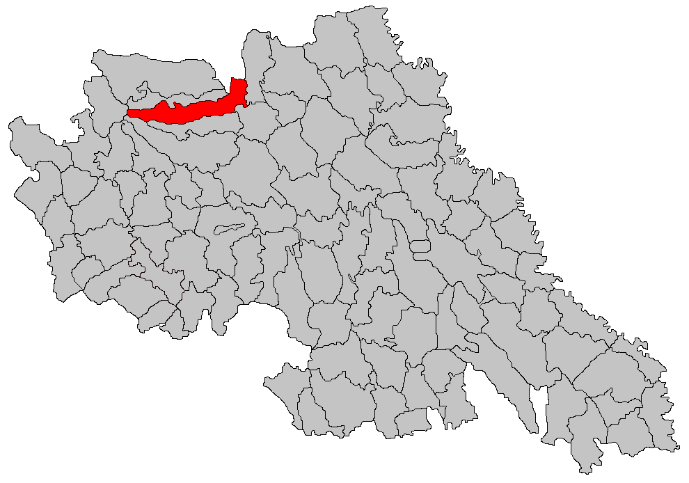 Categorie:Hărţi ale judeţului Iaşi